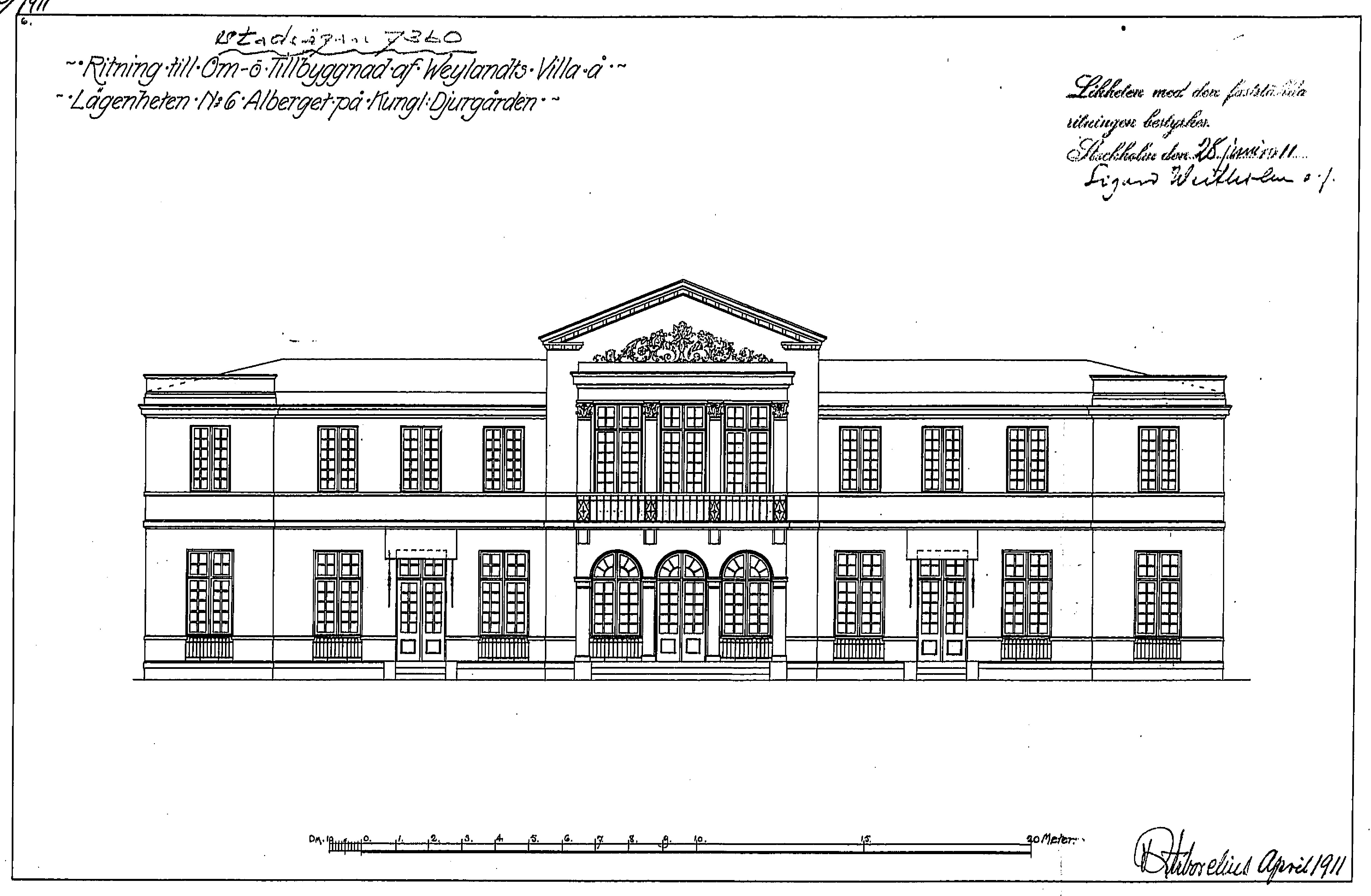 Weylandtska villan, ritning, fasad mot gatan (norr)